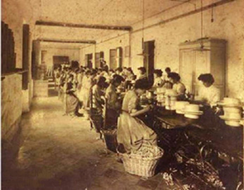 Cucitura dei cappelli di paglia a Lastra a Signa - Italia.